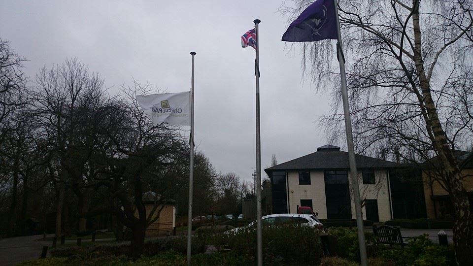 Gilwall Park tiene la bandera a media hasta por el asesinato de Kluivert Roa